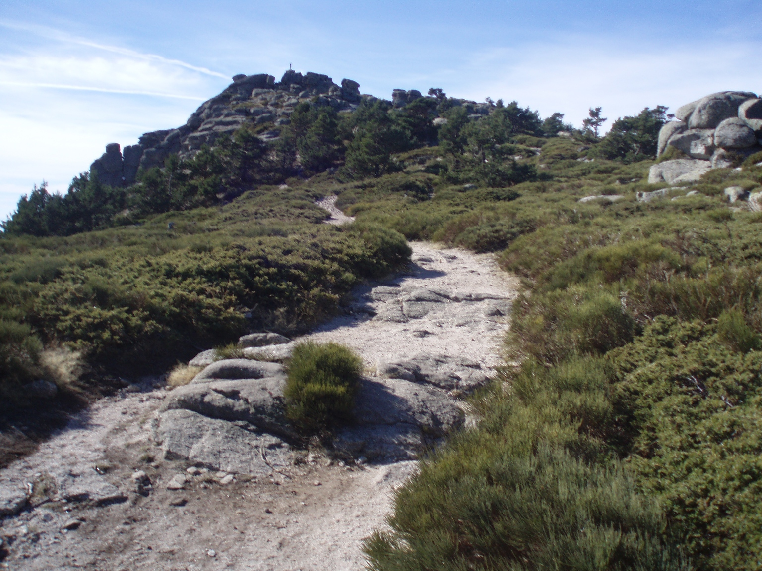 Pico del Alto del Telégrafo (Sierra de Guadarrama, España).